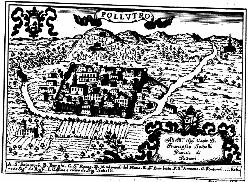 Disegno settecentesco di Pollutri